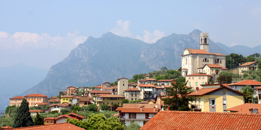 Veduta dell'abitato di Siviano, frazione di Monte Isola (BS)